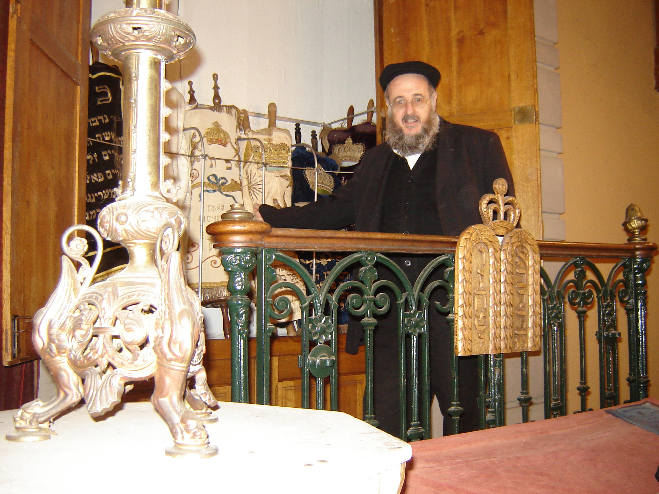 Diemeringen 2009